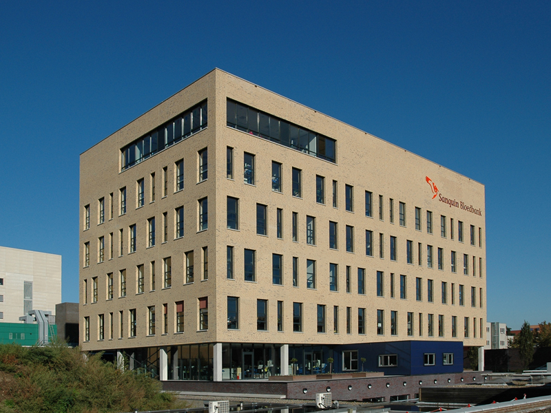 Sanquin bloedbank, Geert Grooteplein Zuid 34, 6525 GA Nijmegen